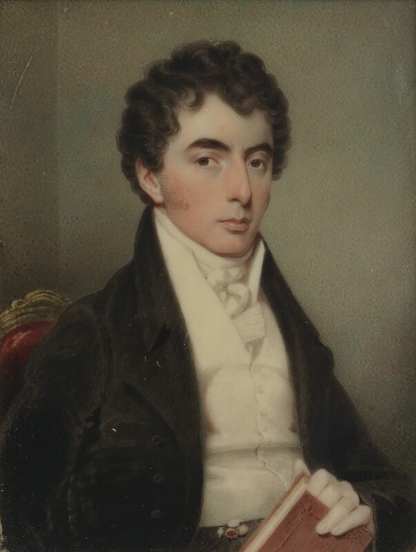 Aguarela e guache em marfim, 1820